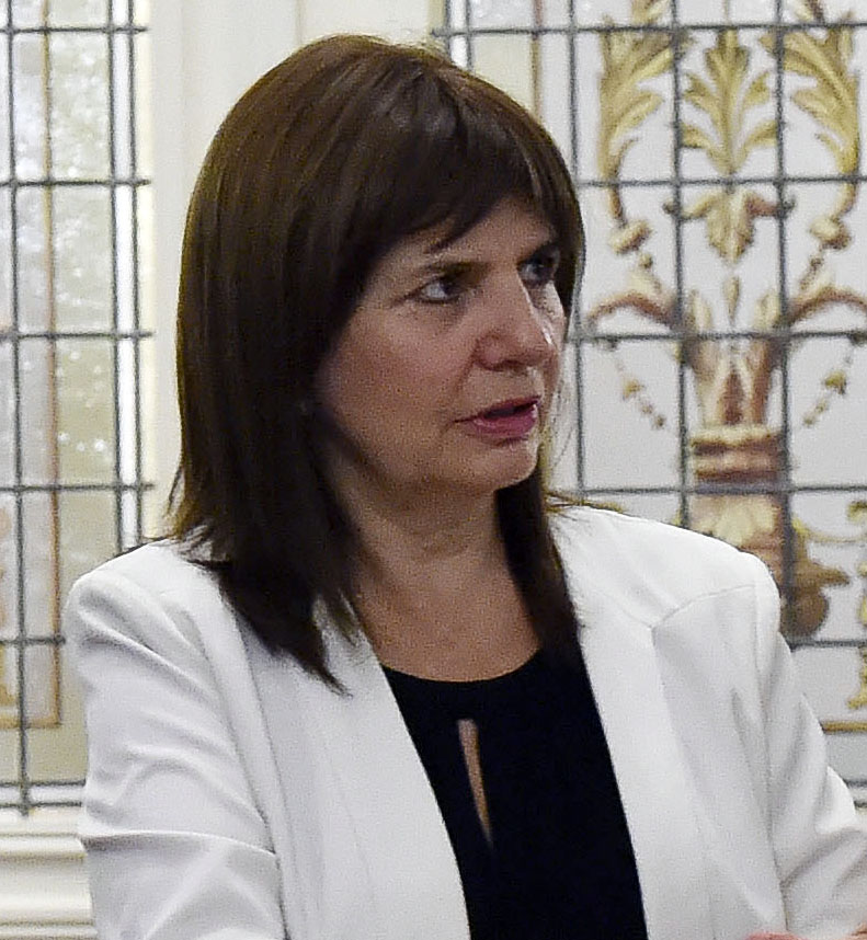 Bullrich en el convenio de traspaso de parte de la Policía Federal a la Ciudad de Buenos Aires.